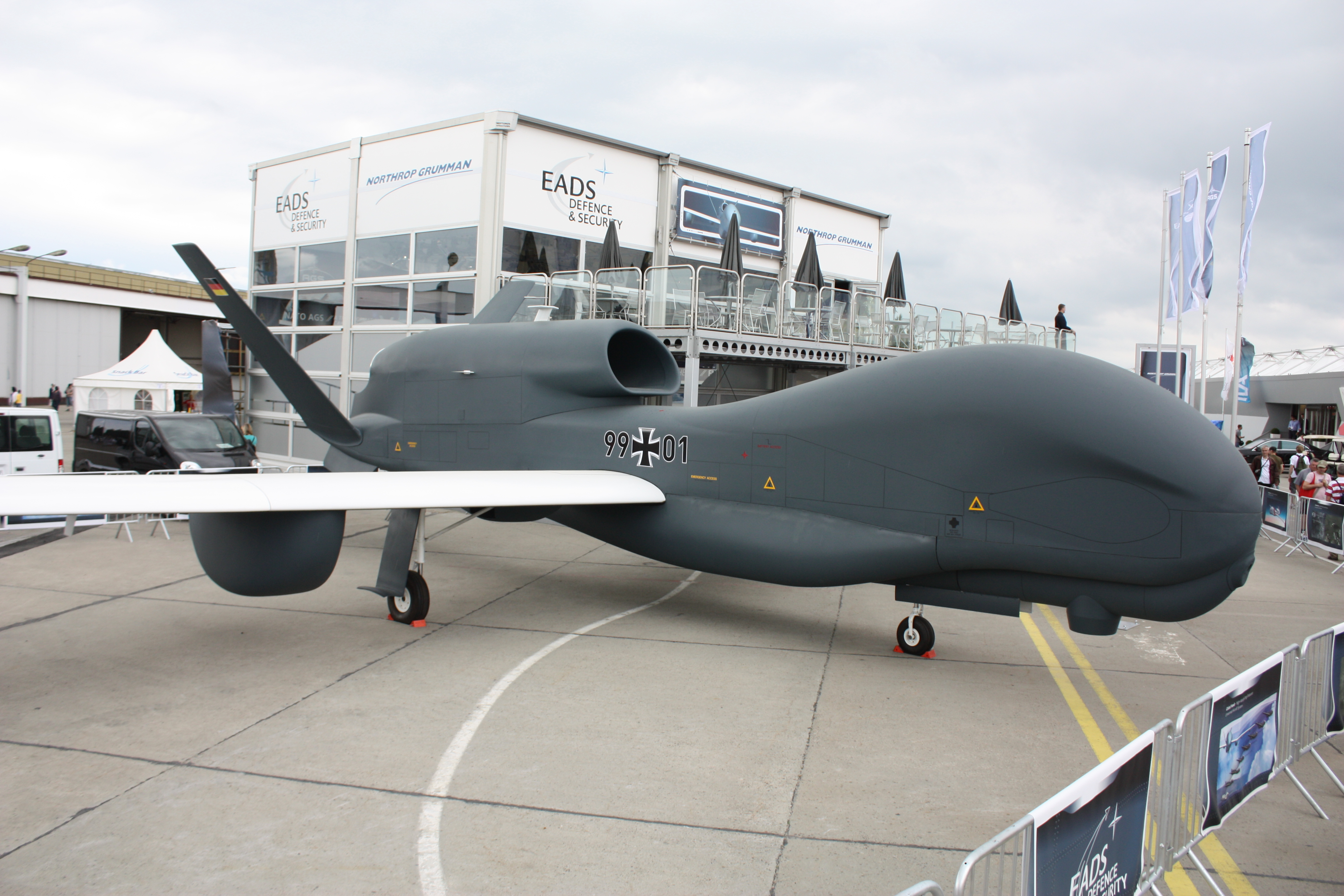 ILA 2010, am Samstag aufgenommen, meist erhöht von einer Leiter fotografiert